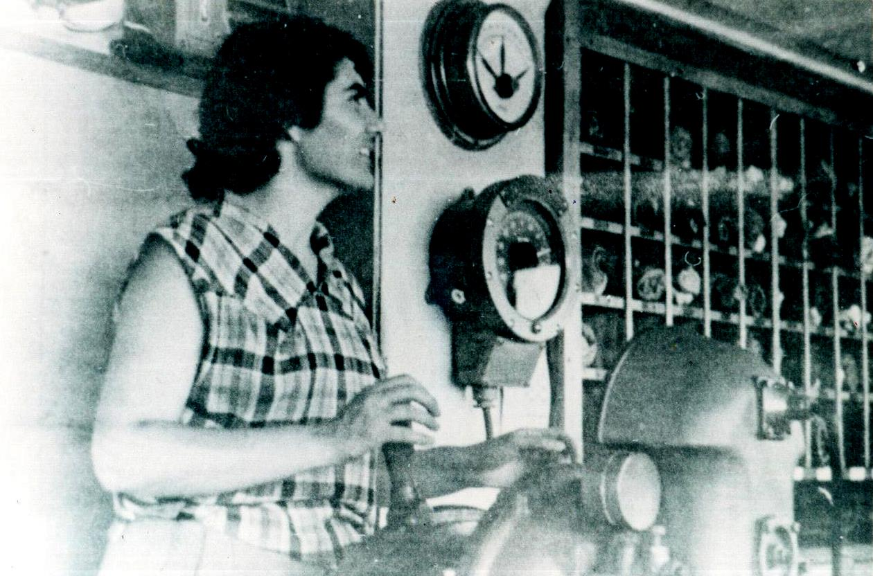 Մետաքսեն նավի վրա